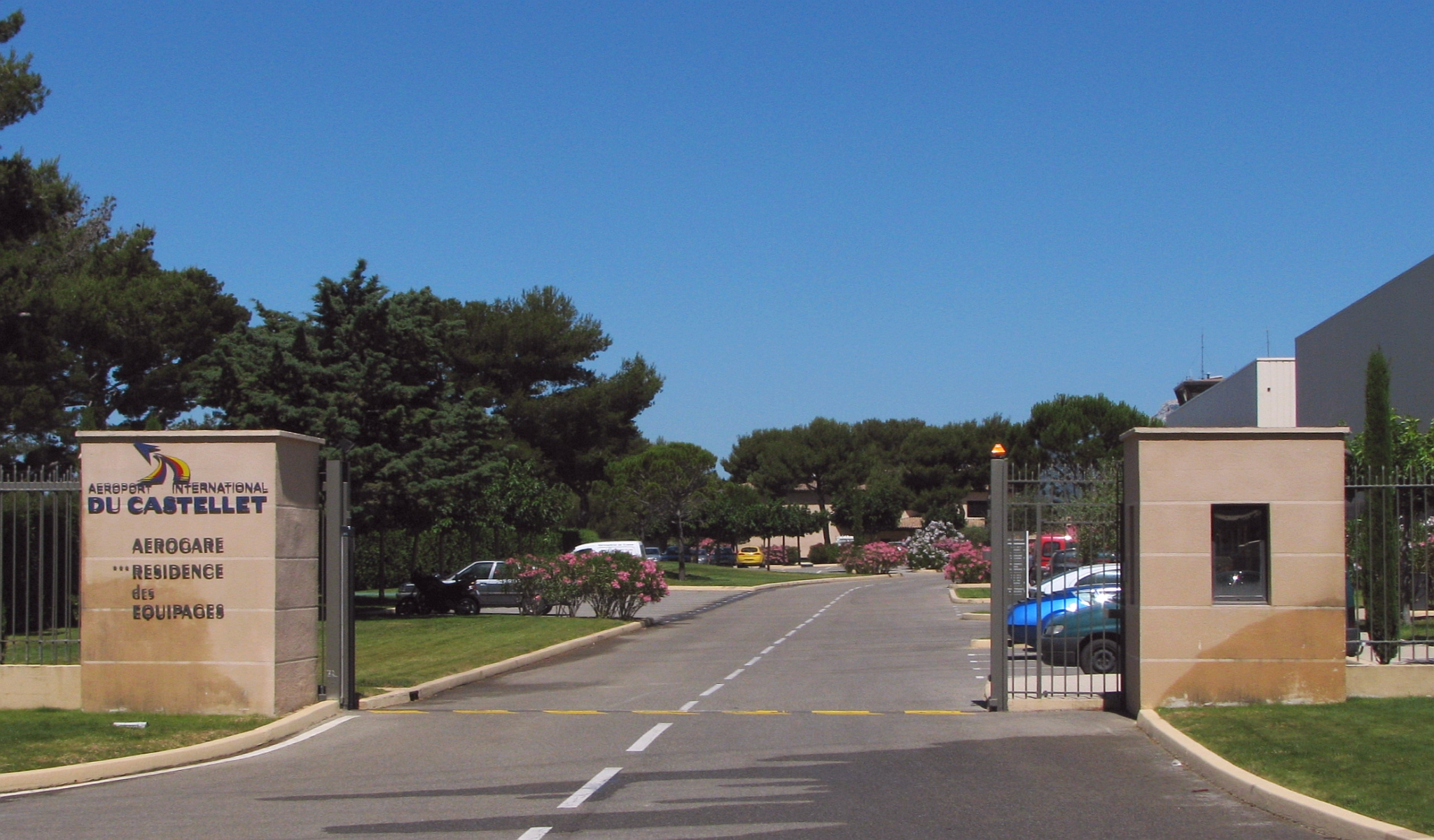 Aeroport International du Castellet, Flughafen Castellet bei der Rennstrecke Cirquit Paul Ricard - Foto Wolfgang Pehlemann IMG_0073